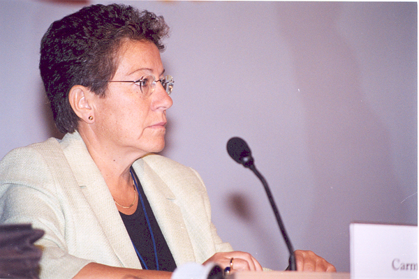 Carmen Alfaro Asins.